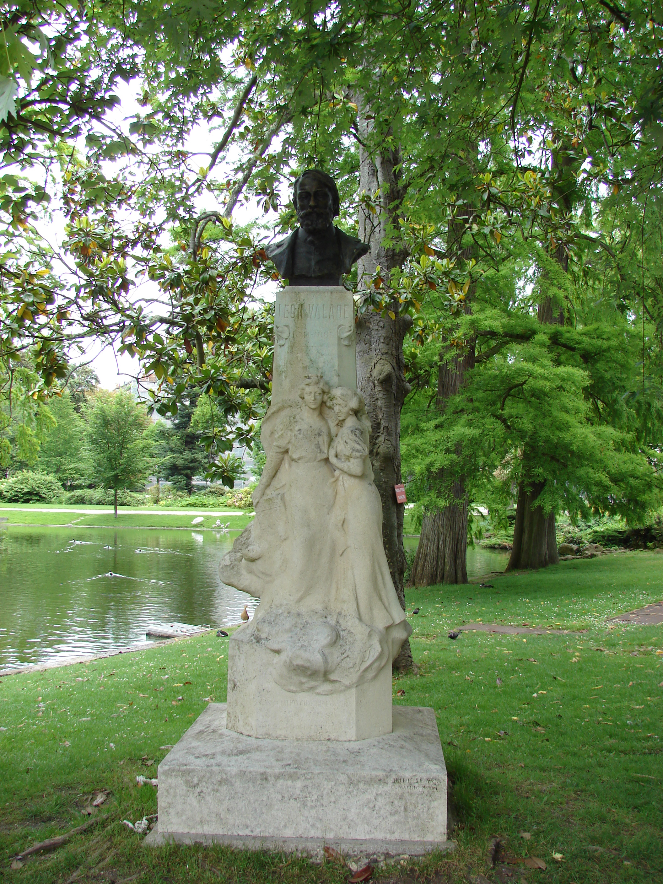 Léon Valade (1841-1883); Jardin Public, Bordeaux, Aquitaine, France